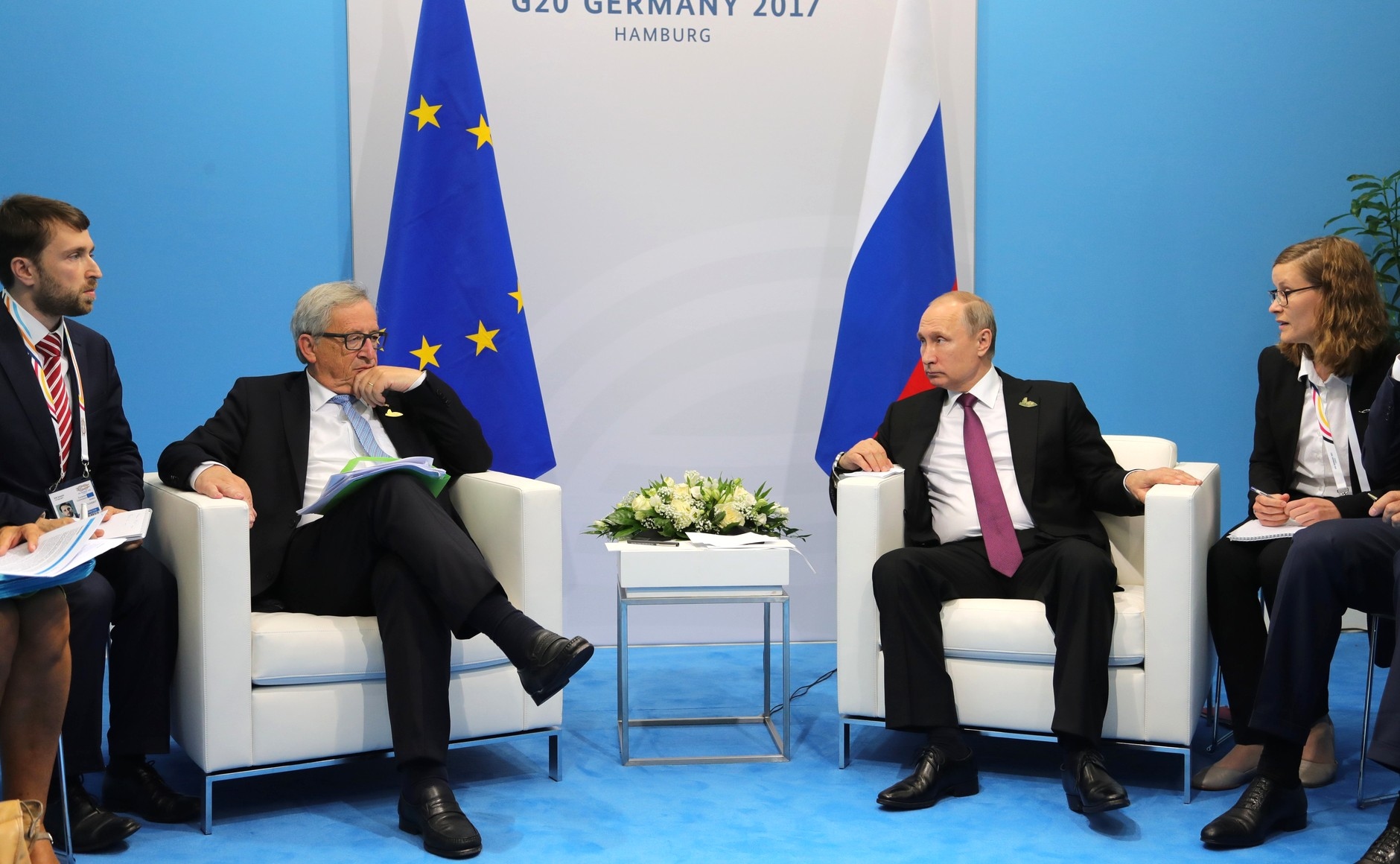 Встреча Президента России Владимира Путина с Председателем Европейской комиссии Жан-Клодом Юнкером на полях саммита «большой двадцатки»